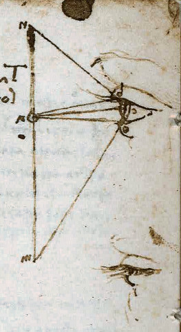 Particolare da foglio 1v del manoscritto B di Francia